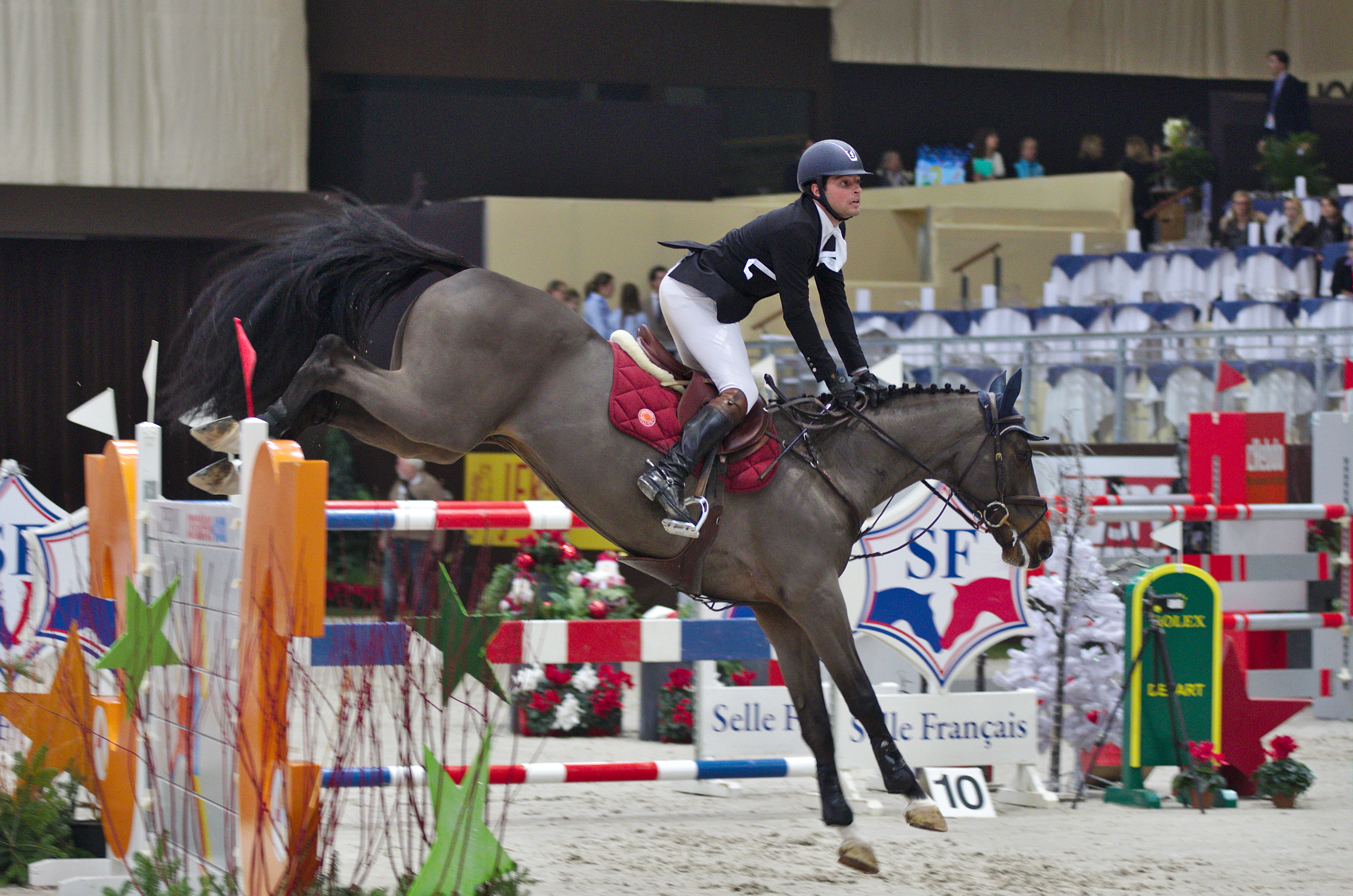 CHI Genève 2013 - 20131212 - Daniel Bluman et Cantando Lyngriis